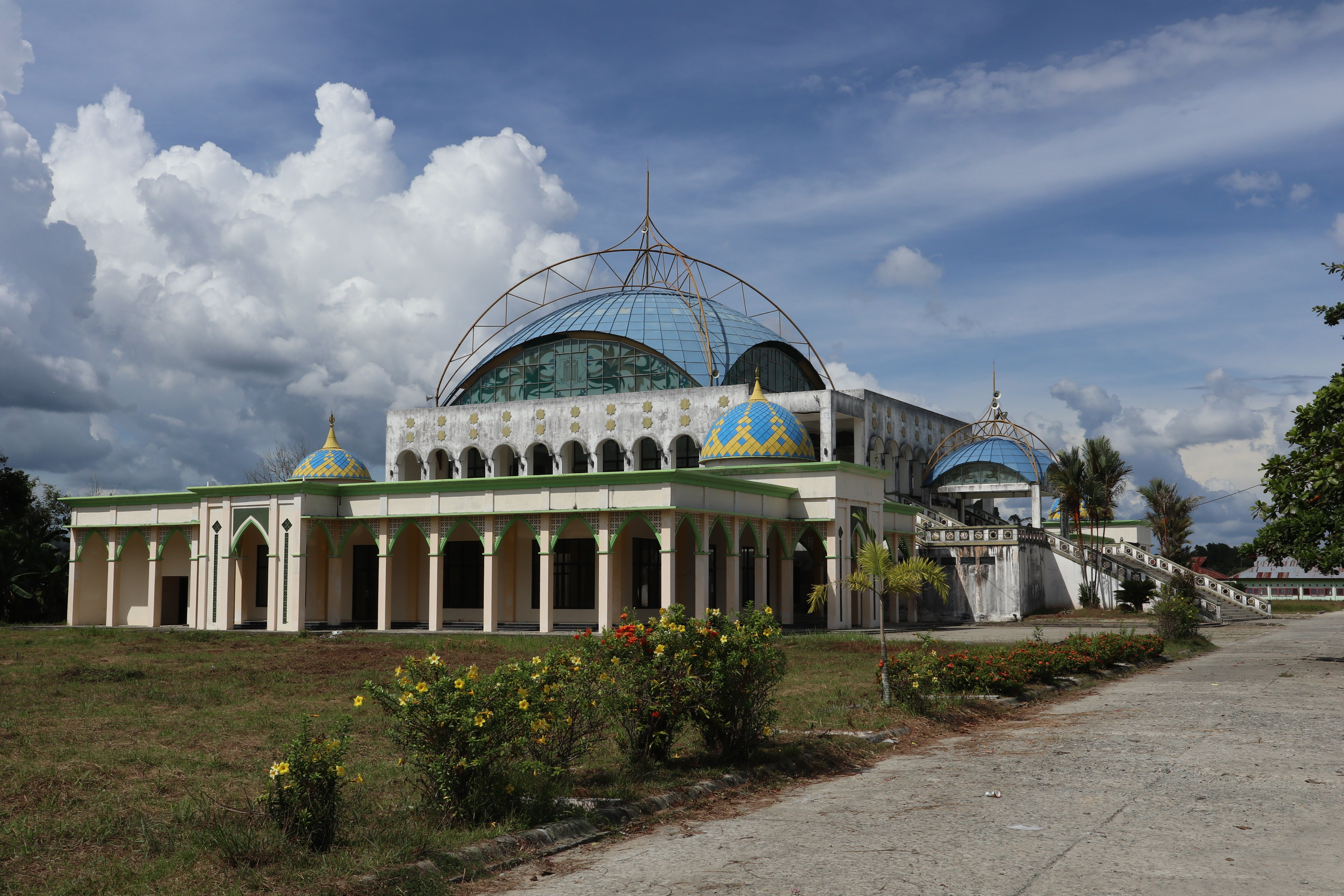 Islamic Center Malinau, pusat kajian Islam di Kabupaten Malinau, Kalimantan Utara.